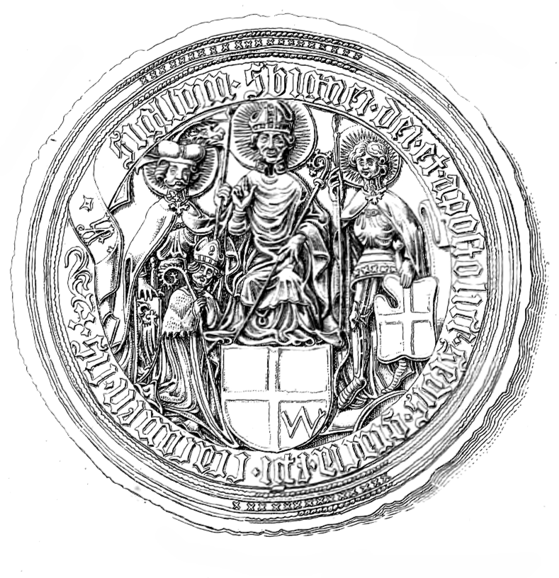 Bishop of Kraków Zbigniew Oleśnicki seal